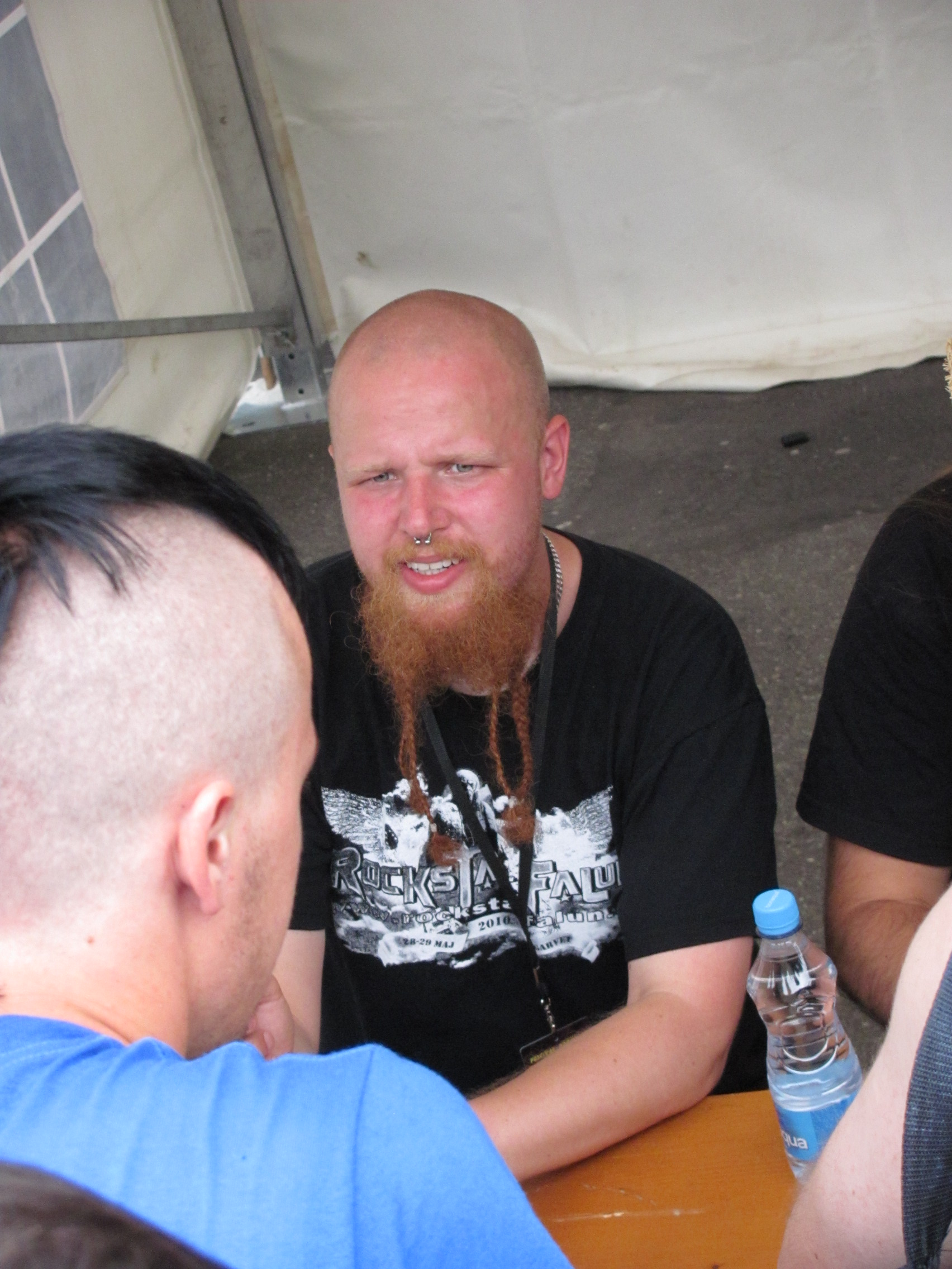 Daniel Myhr, Sabaton, Prosperita stage, Masters of Rock 2010